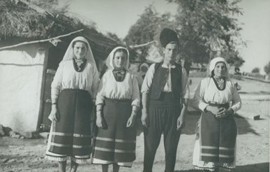 Жители от с. Българи, Бургаско.